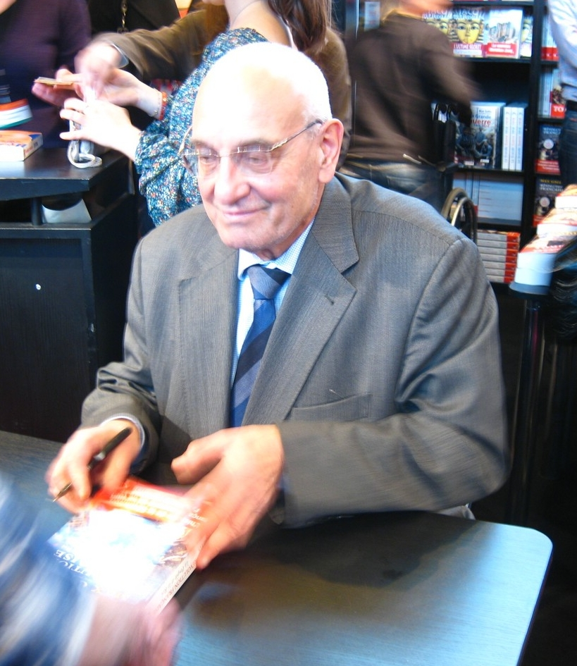 Max Gallo dédicaçant un ouvrage lors du Salon du Livre de Paris le 14 mars 2009.